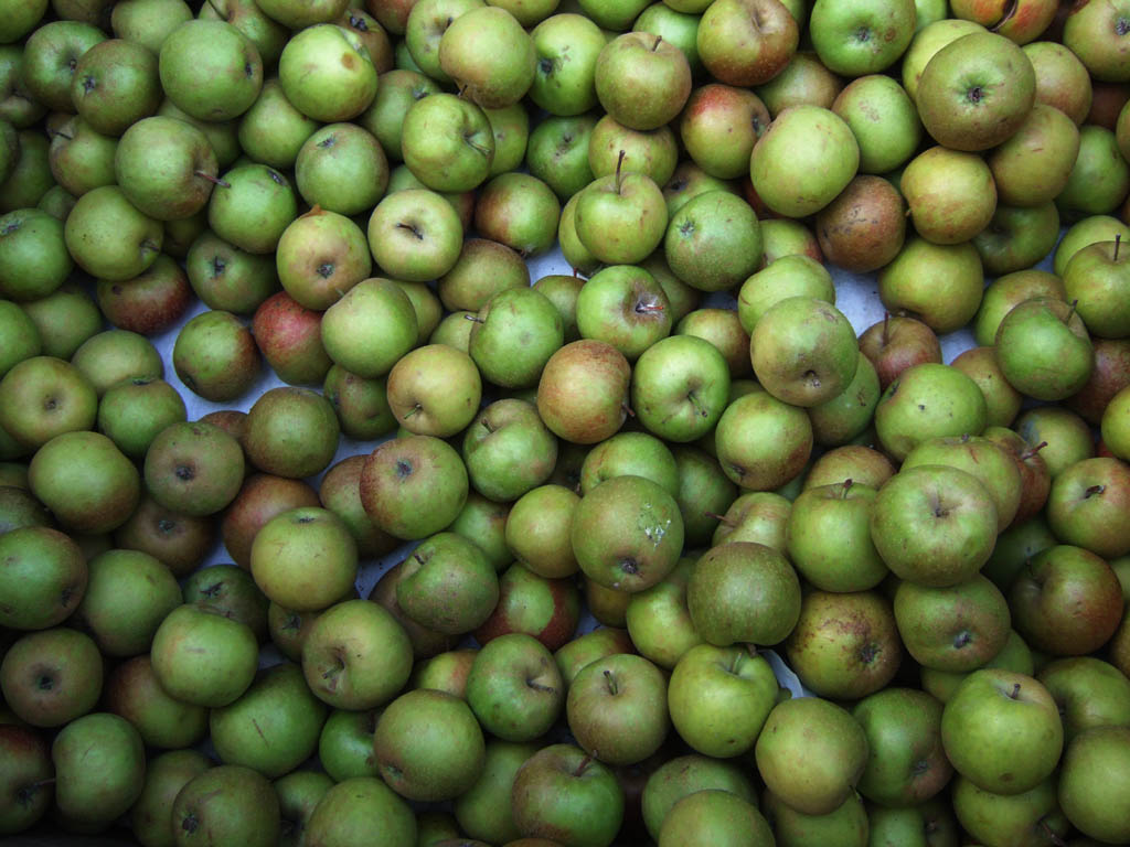 Apfelsorte Schöner von Boskoop